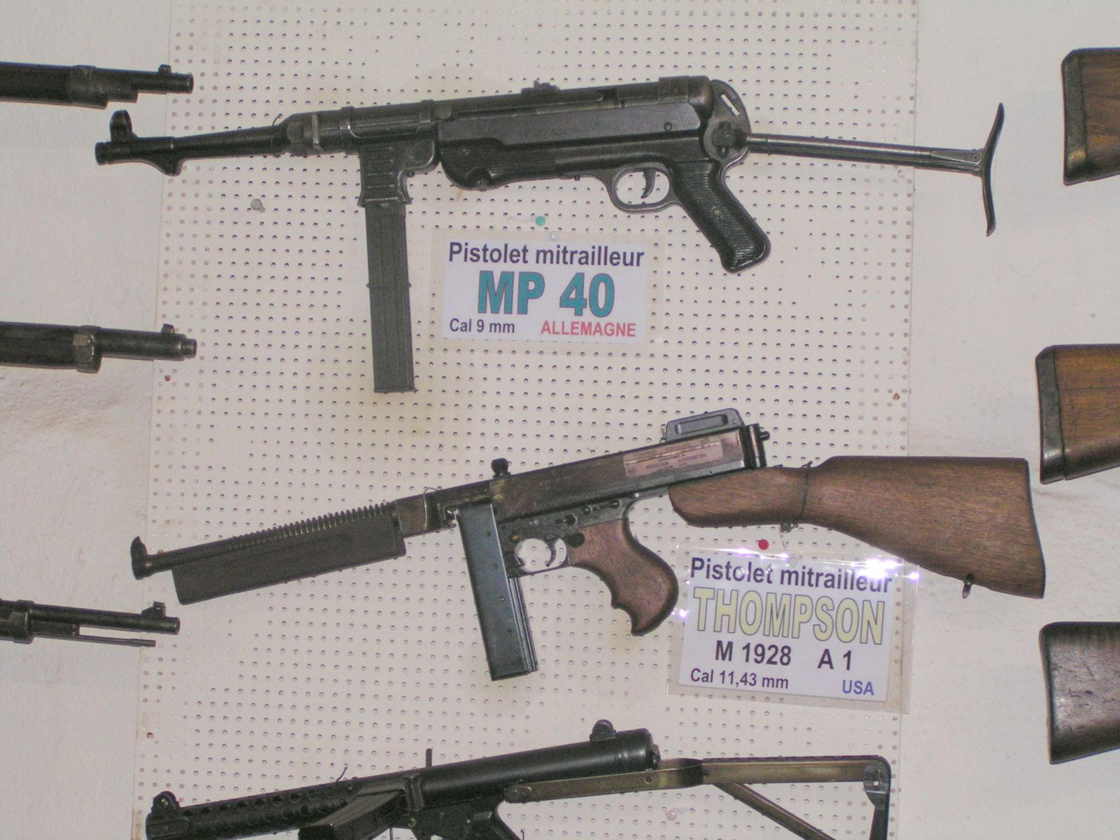 Maschinenpistolen